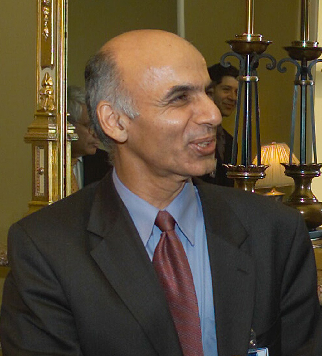 Dr. Ashraf Ghani in 2004.